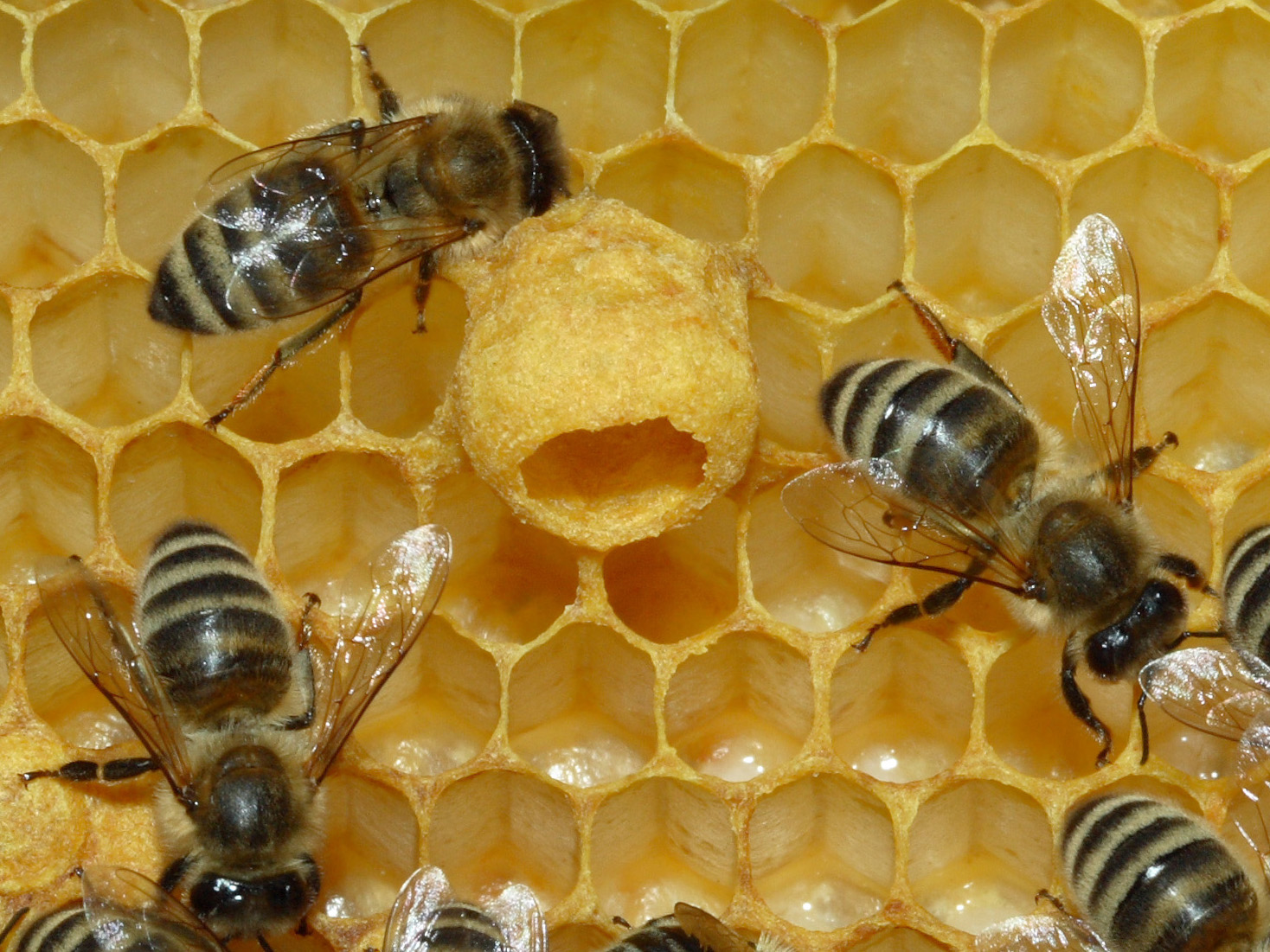 Noch leeres Weiselnäpfchen am Rande einer Bienenwabe. Legt die Königin dort ein Ei hinein, wird die schlüpfende Larve so gefüttert, dass eine Königin heranwächst.